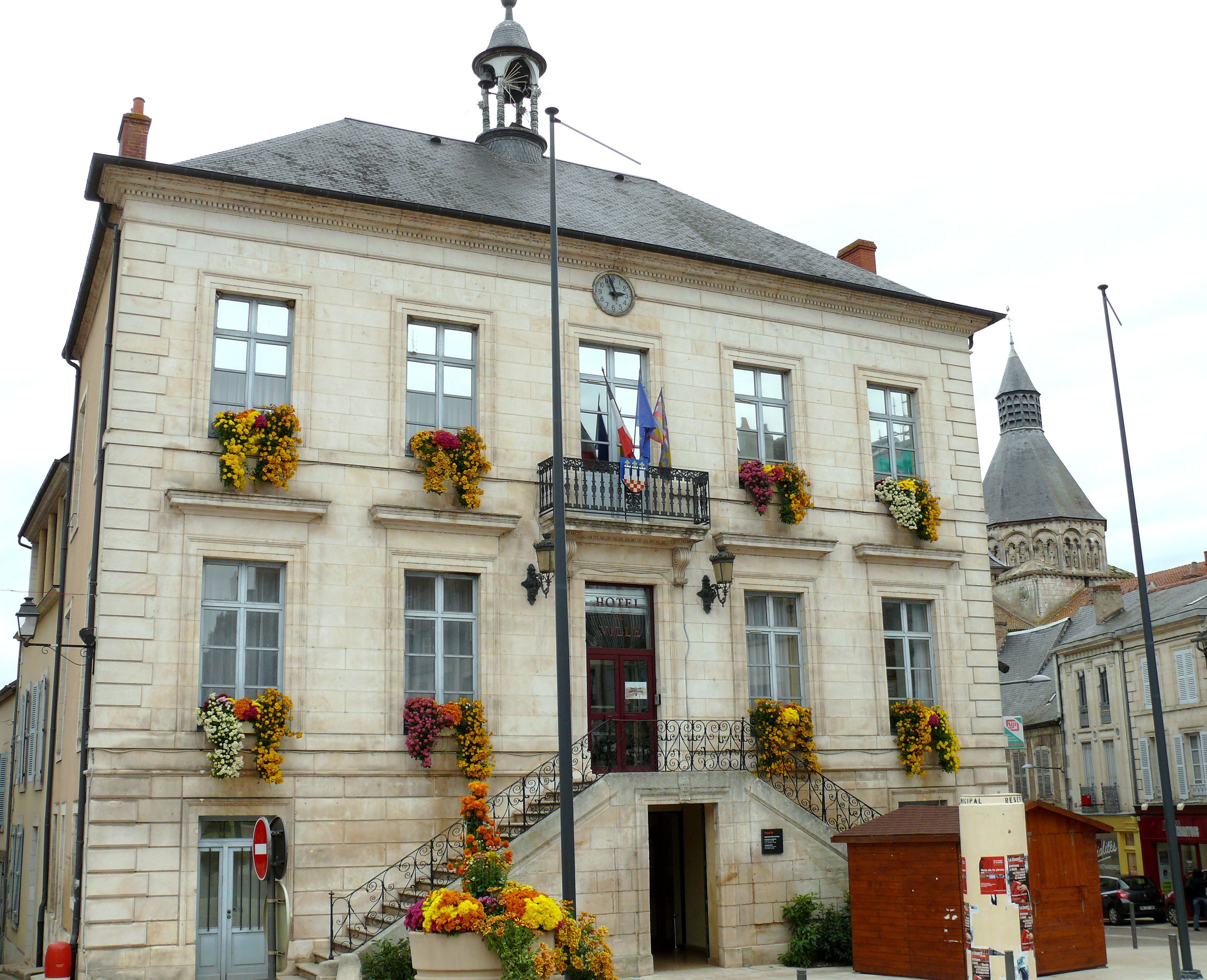 La Charité-sur-Loire - Mairie